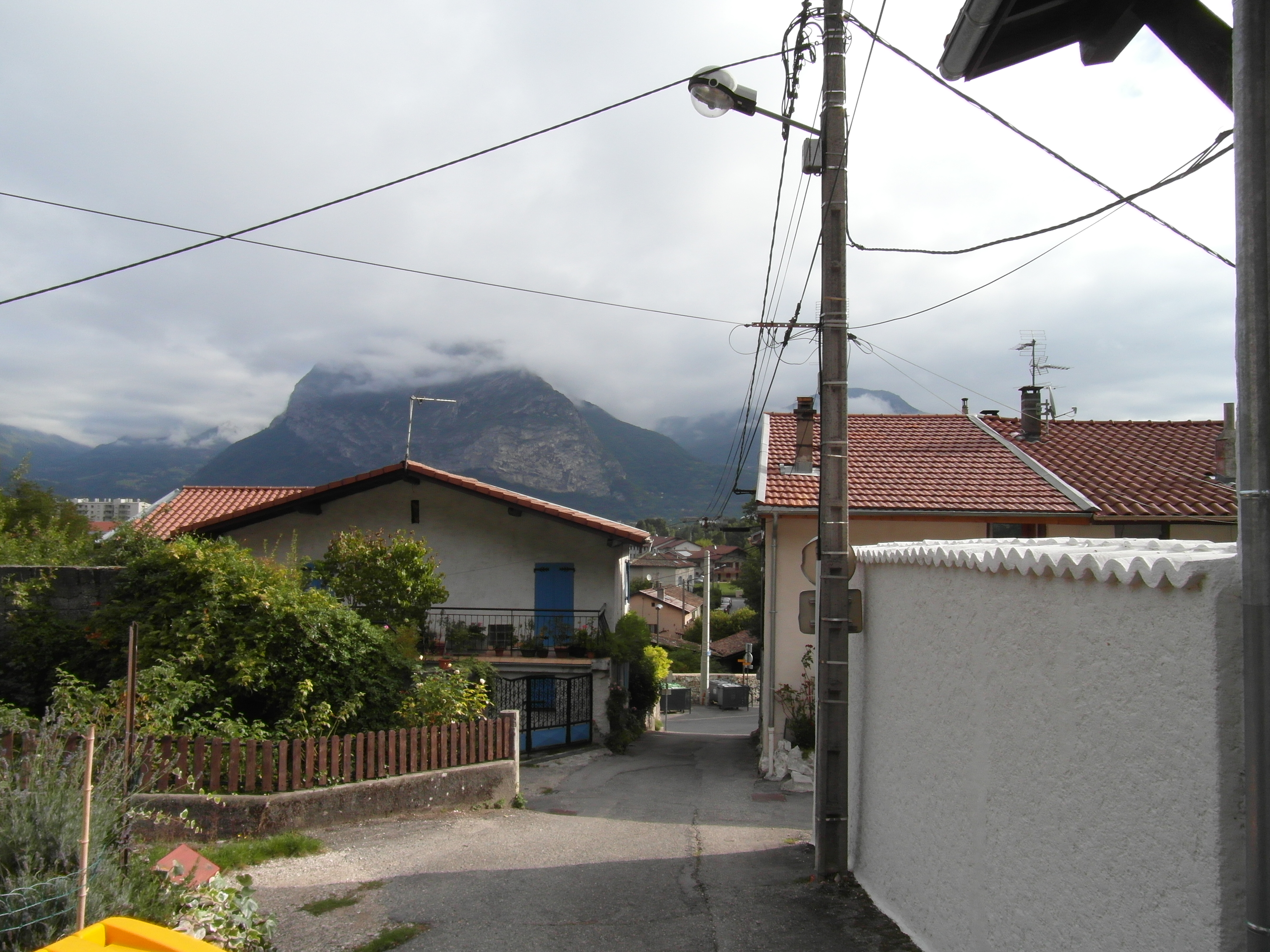 La Poya